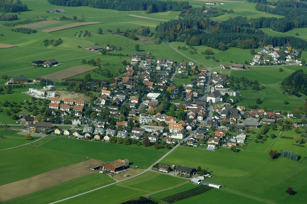 Flugaufnahme des Dorfs Niederhelfenschwil aus Süden, über dem Hohrain-Wald